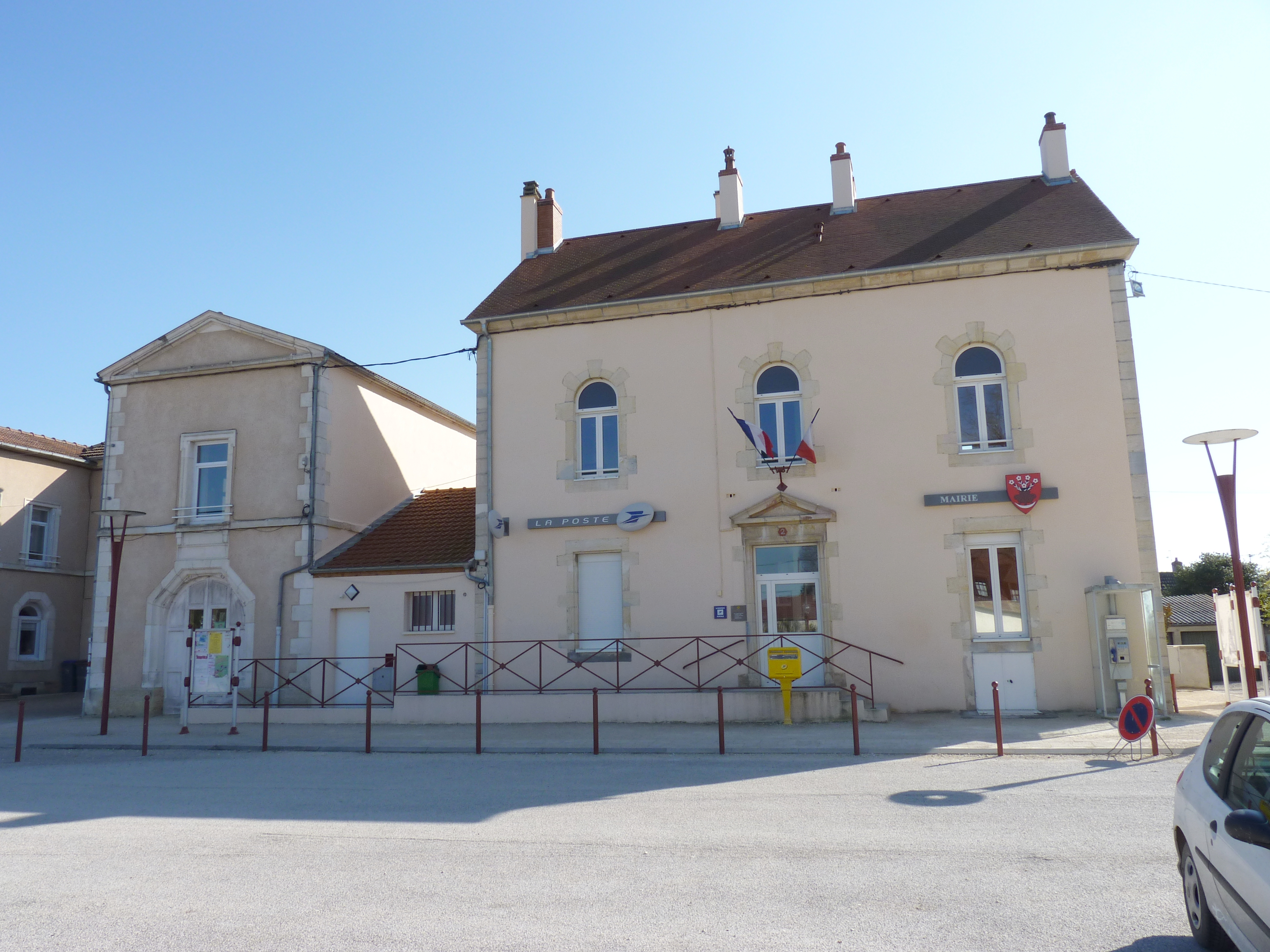 Mairie et bureau de postes, Aiserey (Côte d'Or, Bourgogne, France)